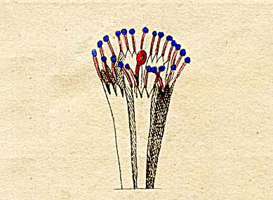 Ausschnitt (Klasse XVIII) aus Ehrets Tafel "Methodus Plantarum Sexualis"